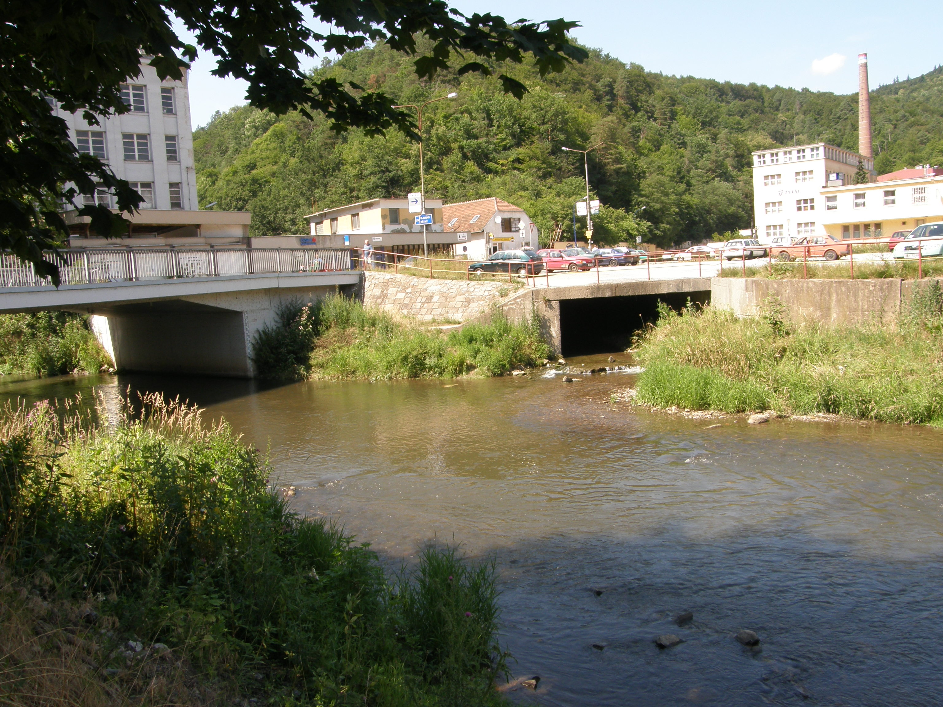 Křtinský potok vlévající se v Adamově do Svitavy